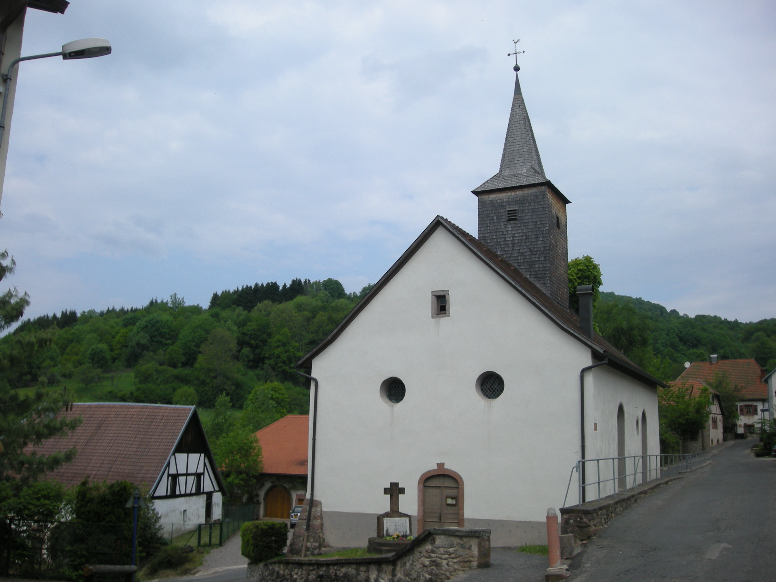 Eglise de Waldersbach (Bas-rhin)